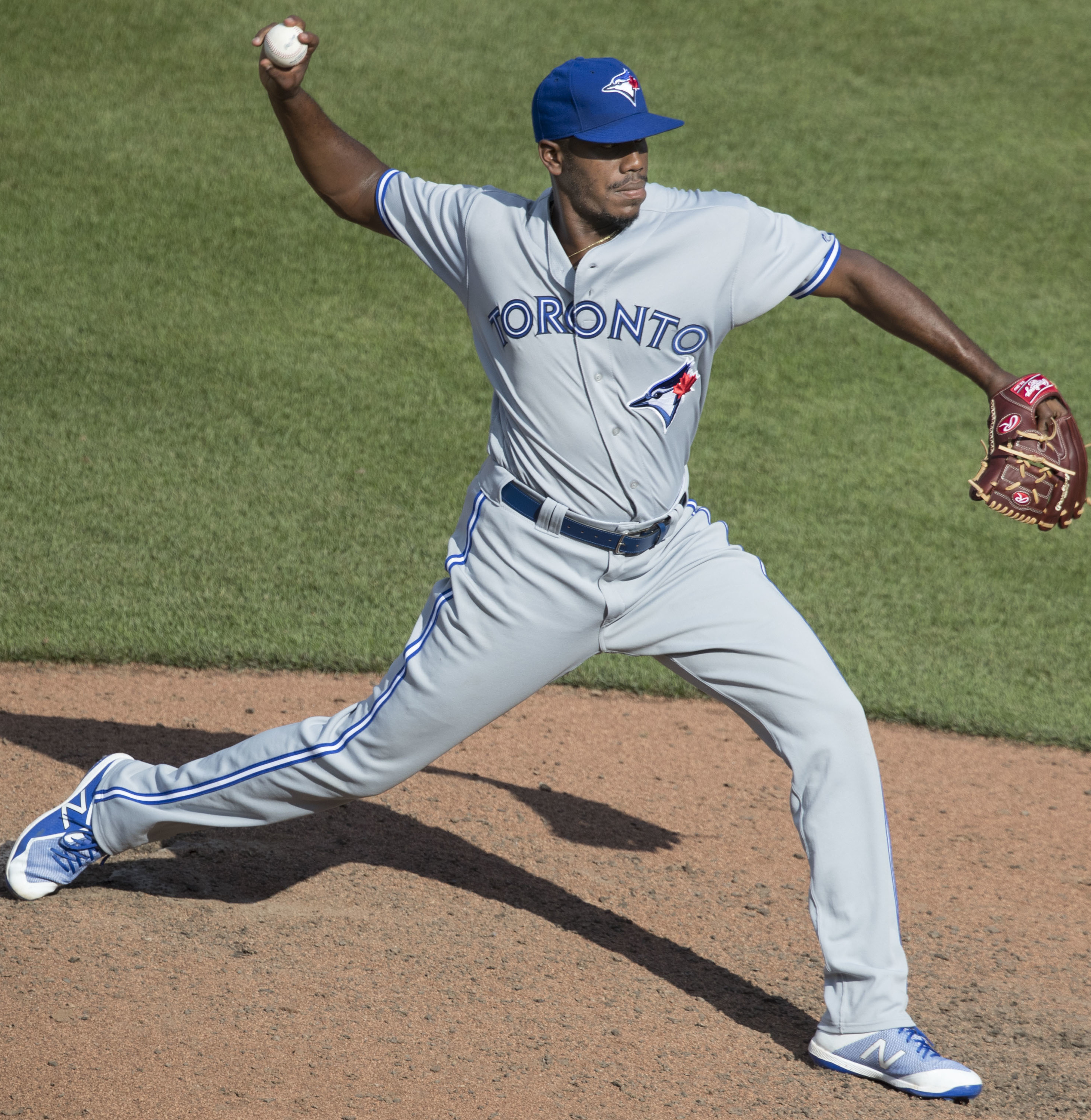 Blue Jays at Orioles 9/3/17